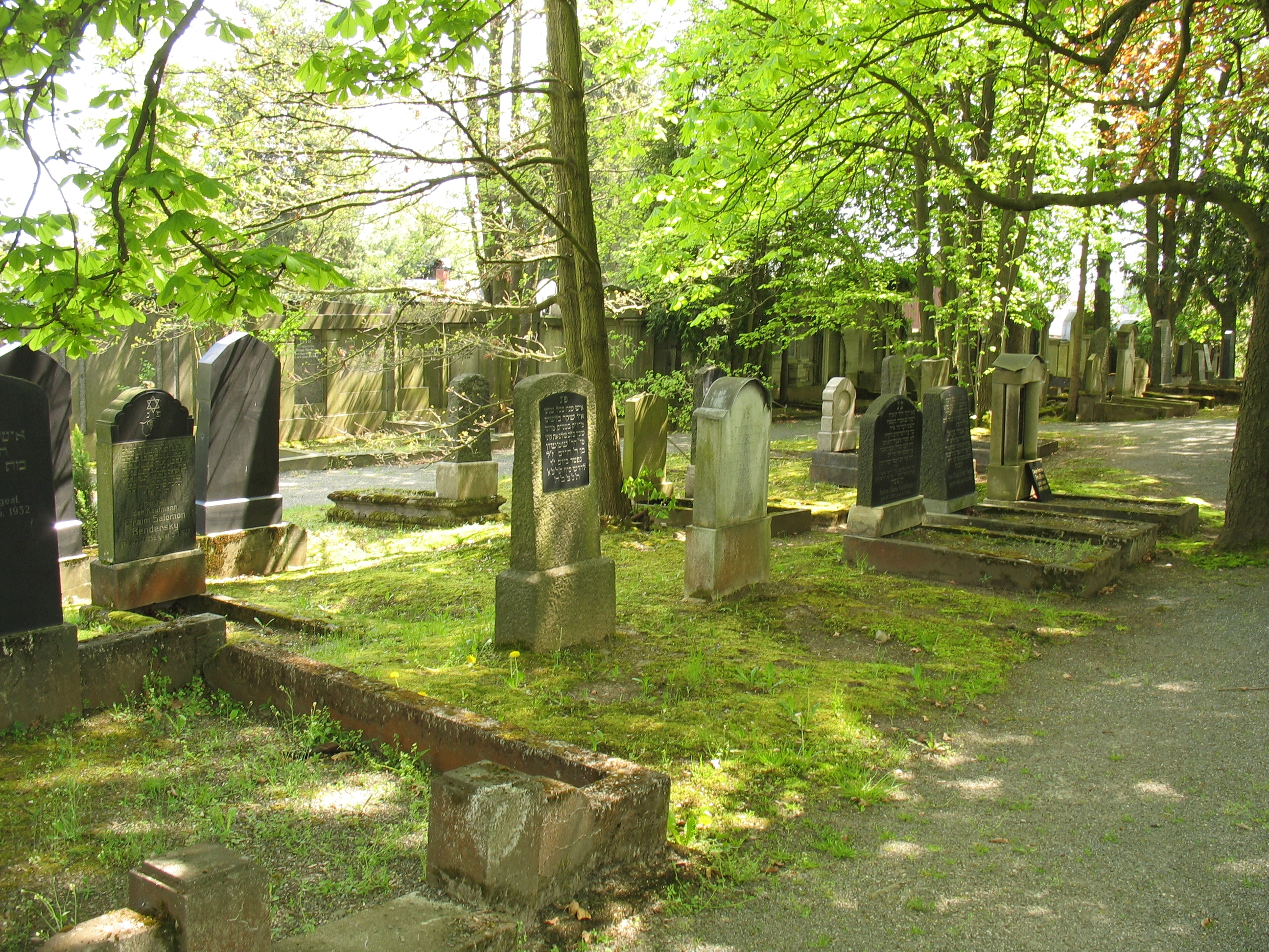 Denkmalgeschützter Jüdischer Friedhof am Tannenhof 7 im Plauener Stadtteil Kauschwitz